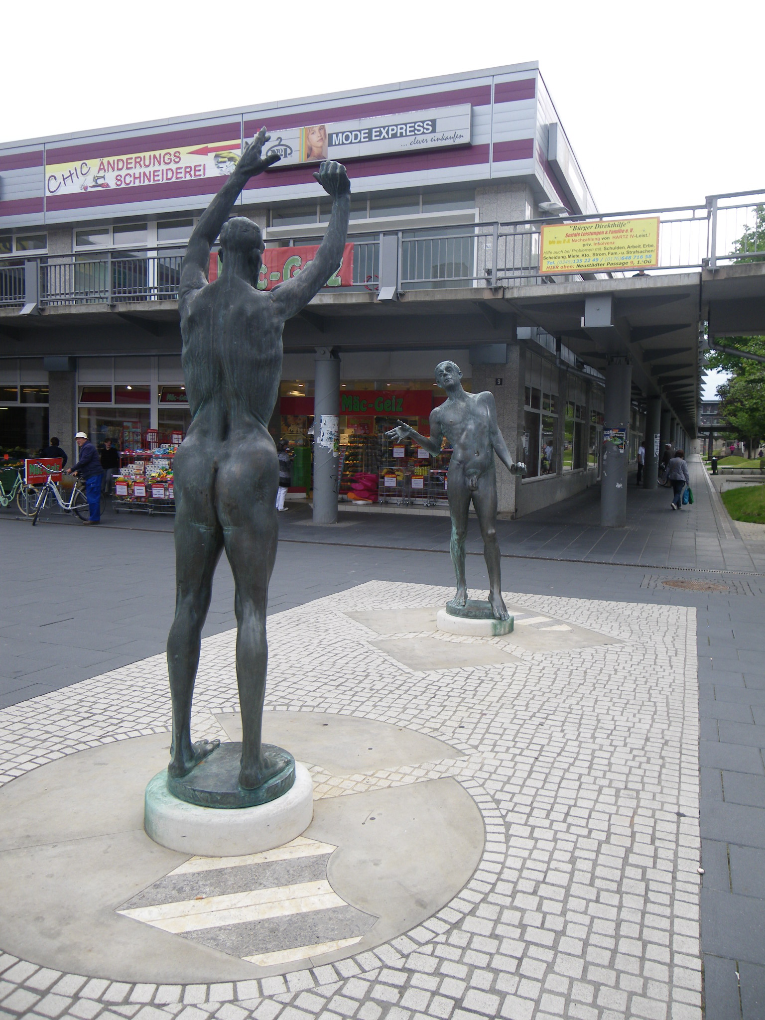 Wolfgang Dreysse (*1947) Rufen und Hören 1989/2010 Bronze (Figuren), Kunststein (Brunnen, Sockel) Neustädter Passage